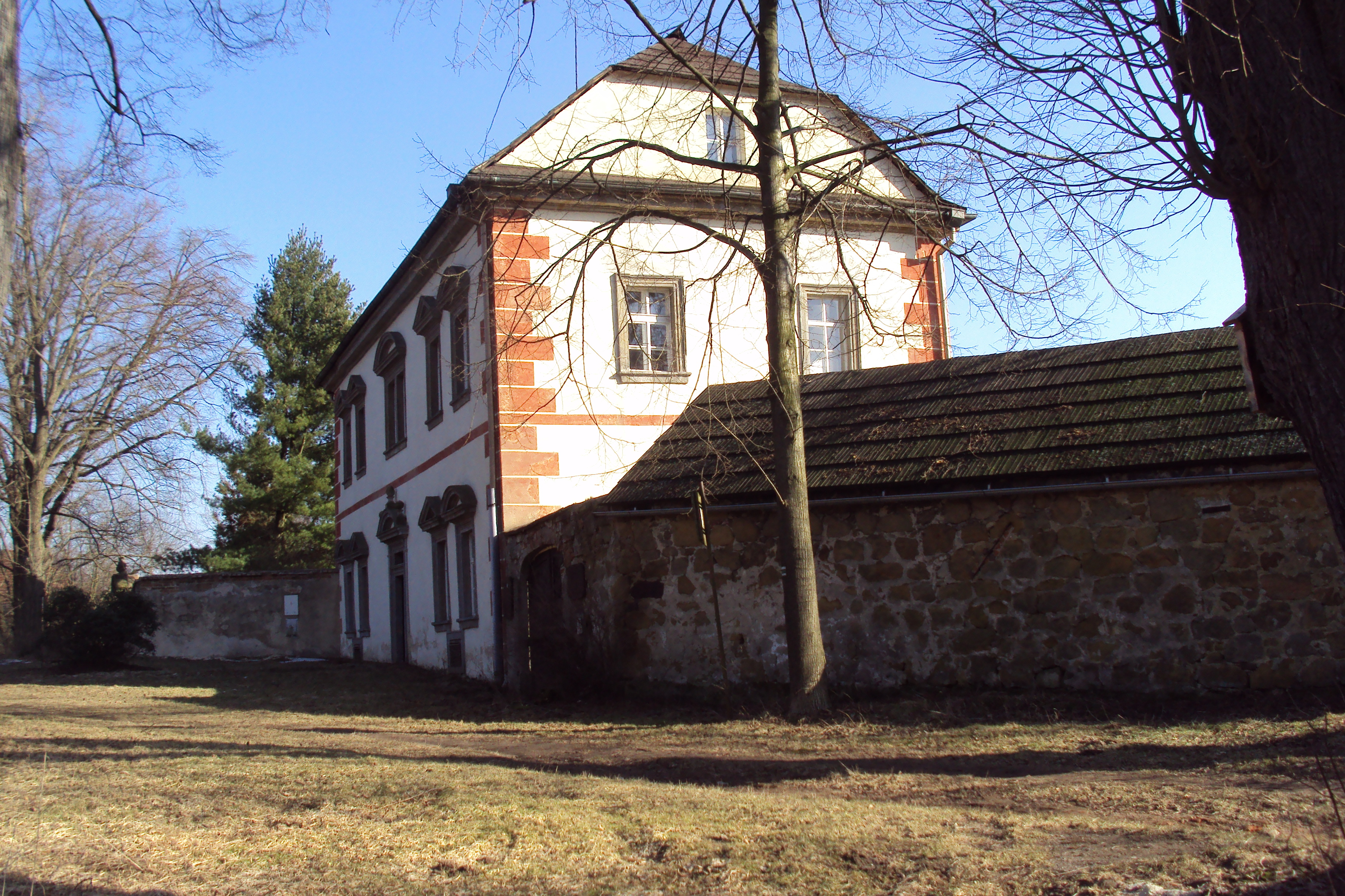 Bredovský zámeček-letohrádek je v areálu u zámku Lemberk, asi 250 metrů od něj na stejném návrší